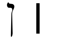 hebrew letter final nun